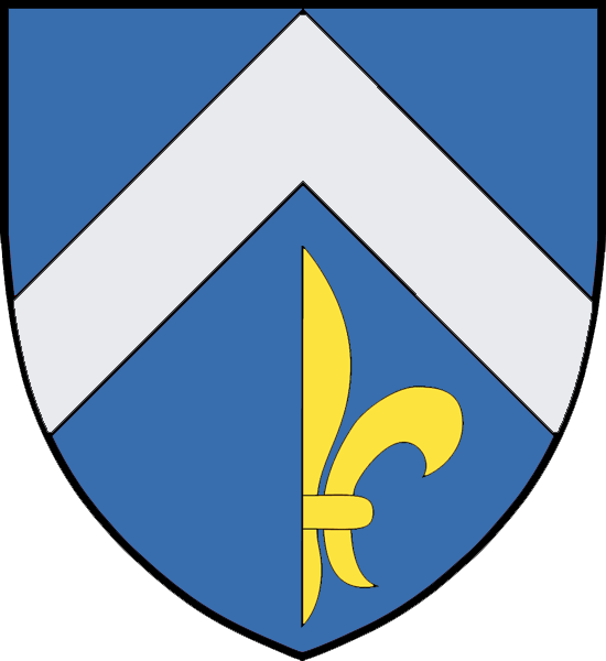 Vapensköld för adelsätten Svenske nummer 258 (sparre över halv lilja)